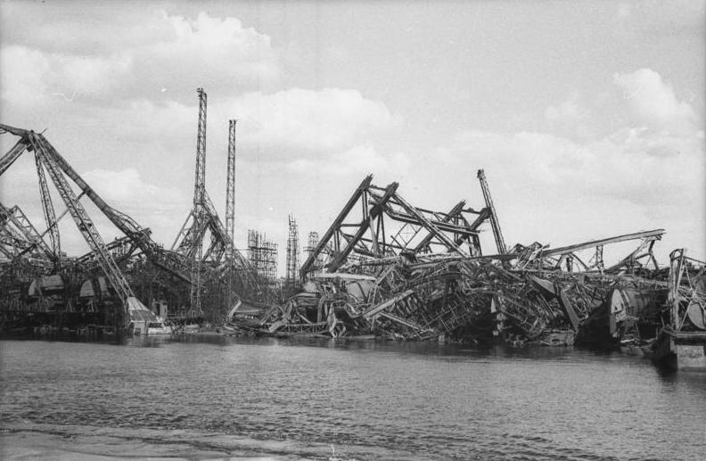 Hamburg, Zerstörte Hafenanlage Hamburg-Steinwerder, Die auf Anordnung der britischen Militärregierung 1946 gesprengten Helgengerüste von Blohm & Voss mit U-Booten des Typs XXI, Foto von 1948 5050-50